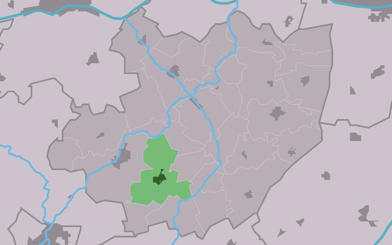 Kaartsje fan himrik fan Easterein